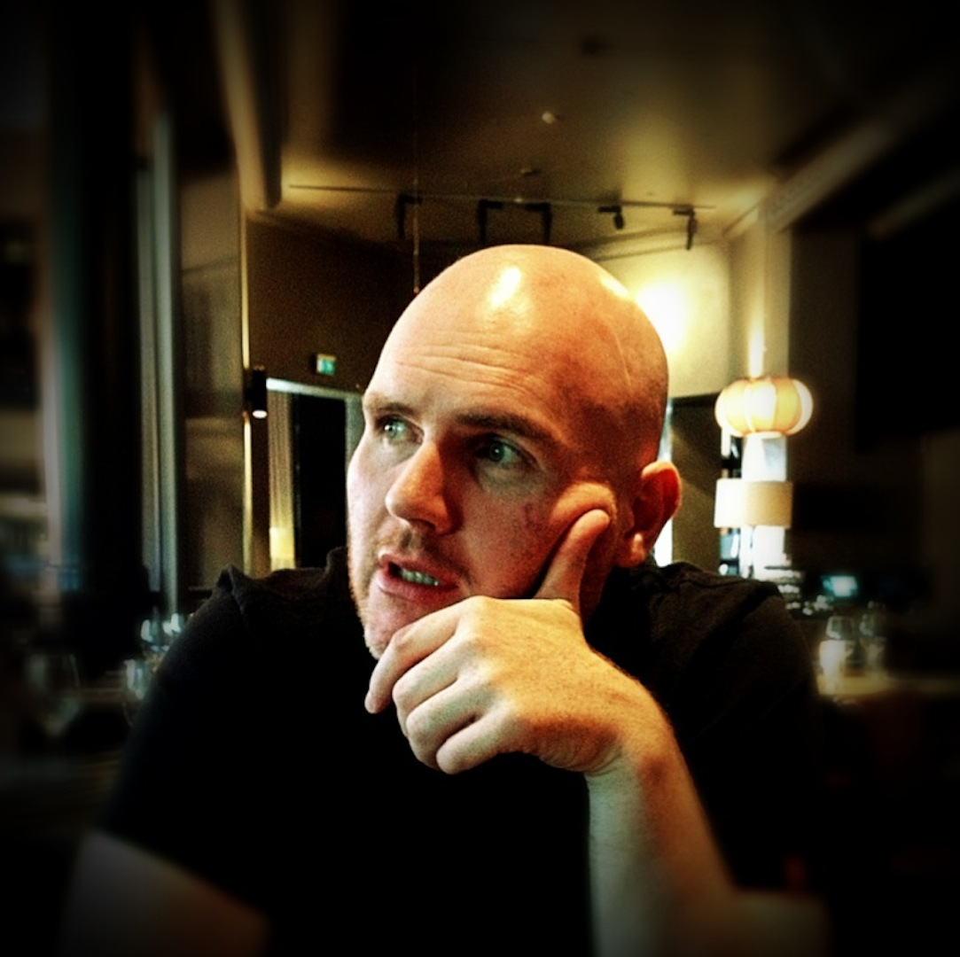 Jan Roar Leikvoll ved utdeling av Stig Sæterbakkens minnepris, Oslo